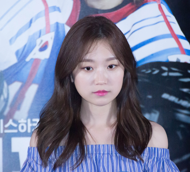 160804 국가대표2 무비토크 김슬기